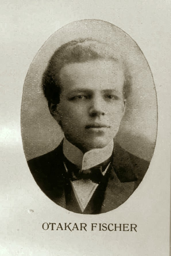 Otokar Fischer (1883 - 1938), Český literární historik, dramaturg a básník.